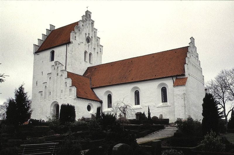 Ejby Kirke (Køge Kommune) i Danmark. Ejby kirke